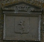 Blason famille de Montecler